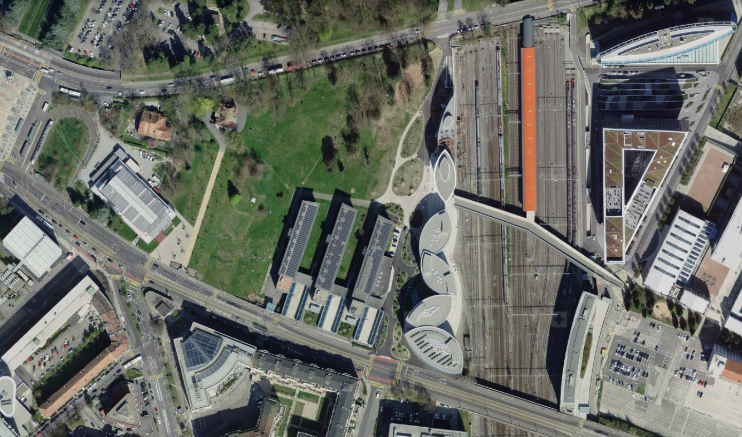 Photo satellite, de Swisstopo, du Collège Sismondi, à Genève (GE), en Suisse.